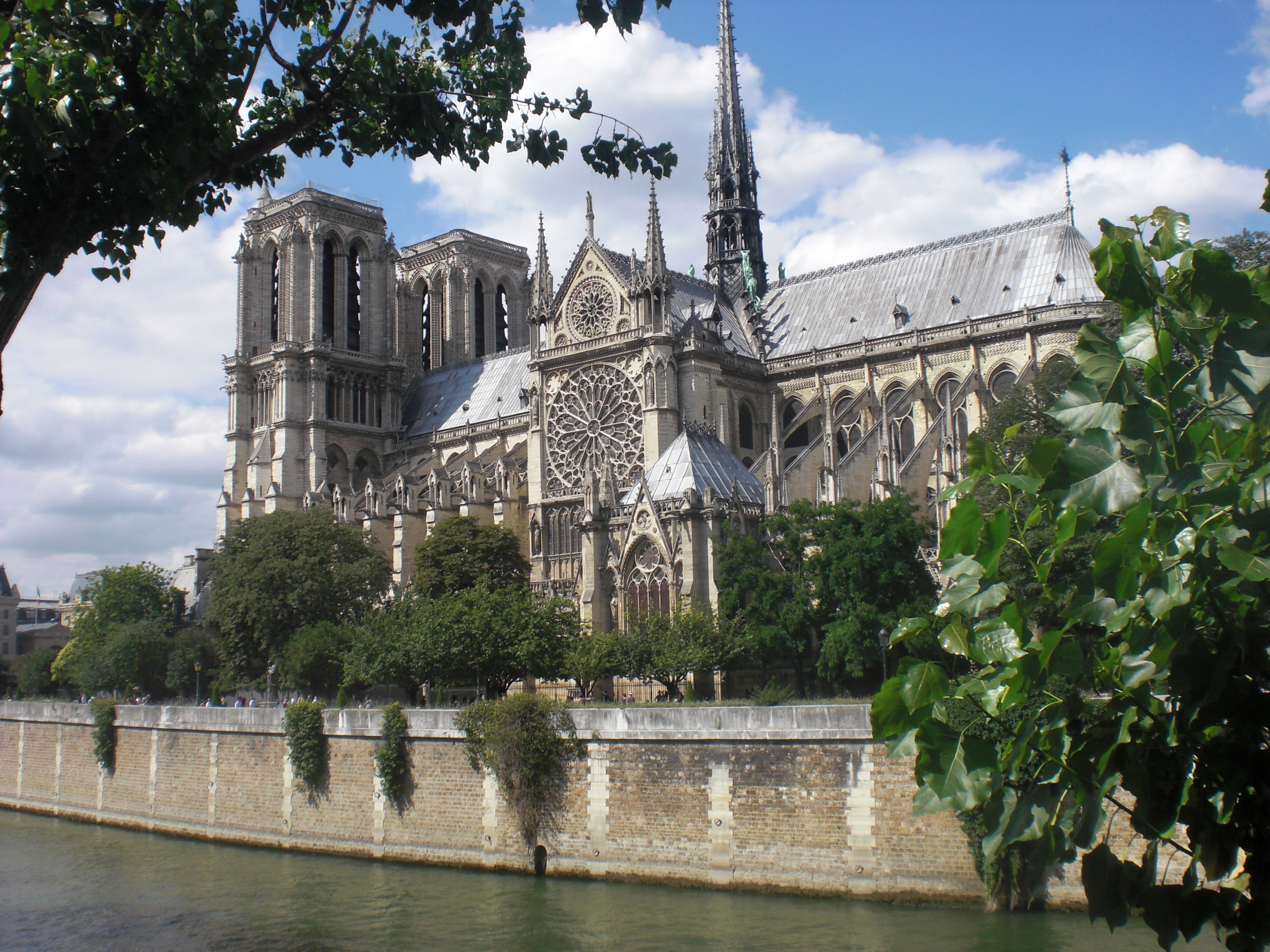 Katedralo de Parizo, flanka fasado al la rivero